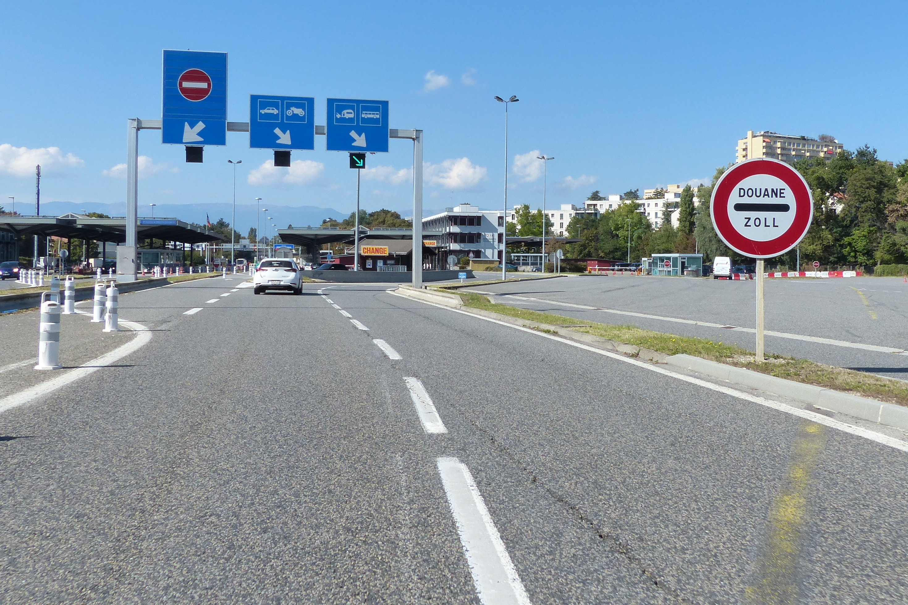 Panneaux B4, J11, B1, SC3, SC13, SC14 et SC15, sur l'A411 à Gaillard, Haute-Savoie.